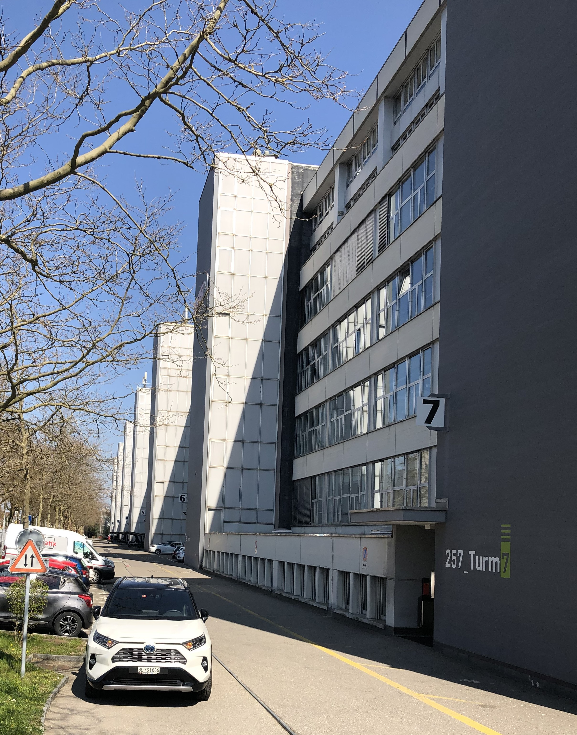 Bodenweid Business- und Gewerbepark